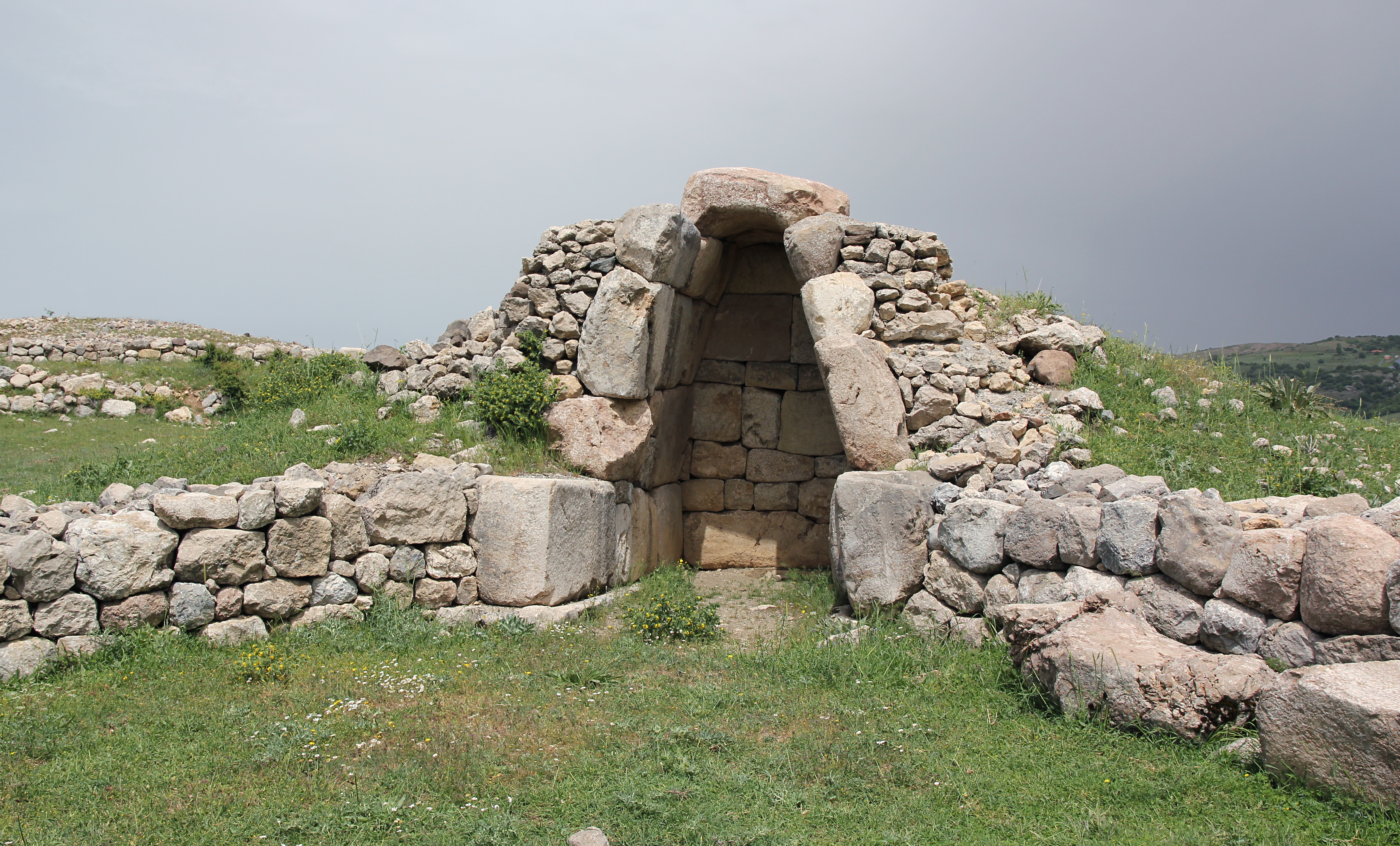 Hethitische Hauptstadt Hattuša bei Boğazkale, Zentraltürkei, Südburg, Kammer 1